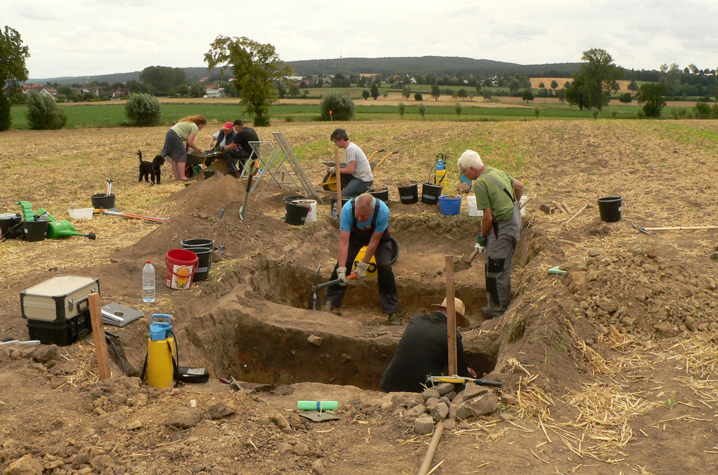 Ausgrabung der Wüstung auf dem Lindenbrink mit Freilegung eines Grubenhauses